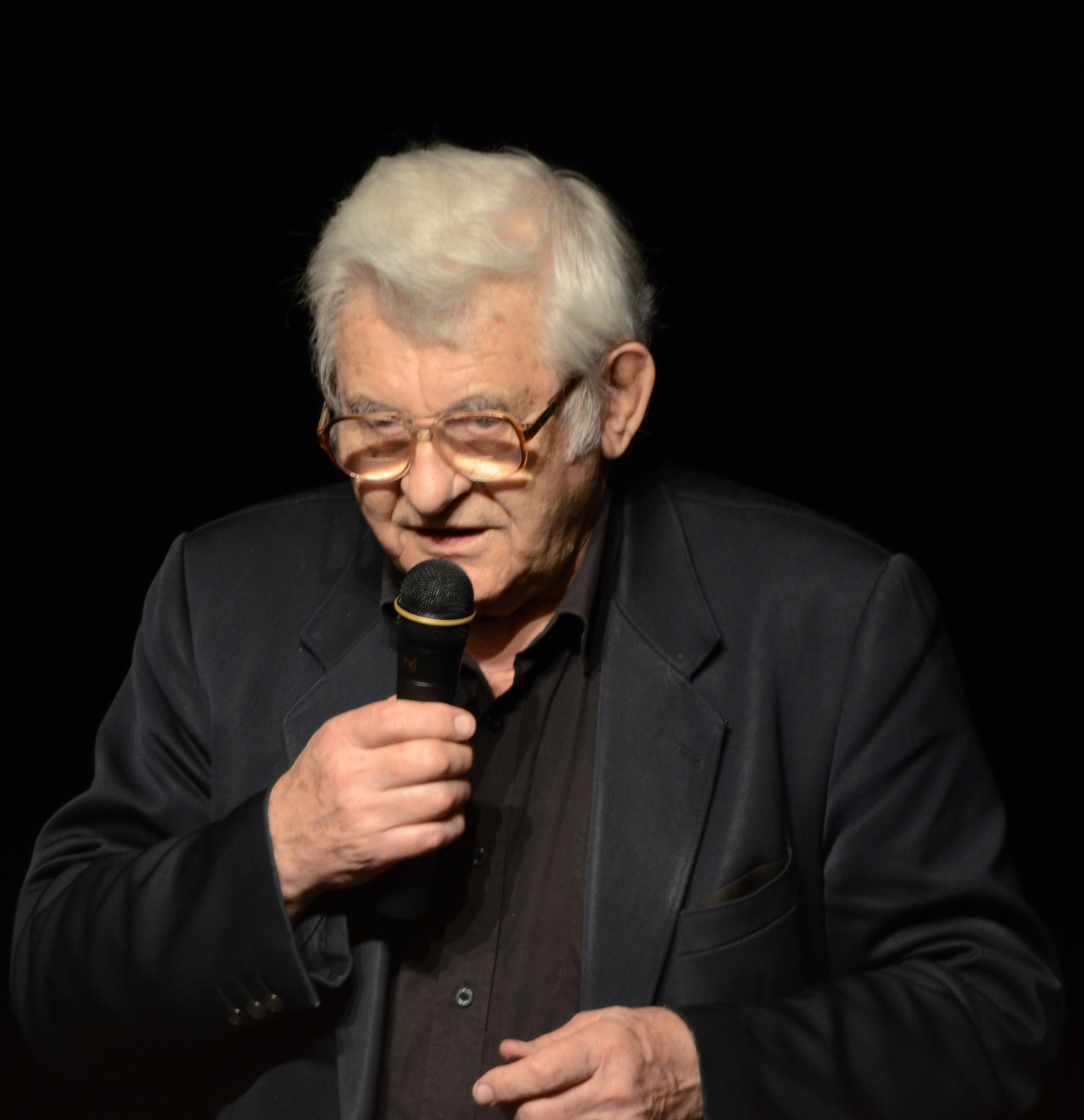 Scriitorul Marcel Petrișor, cu ocazia prezentării cărții "Cumplite încercări, Doamne", în cadrul unui eveniment dedicat memoriei foștilor deținuți politici ([1])